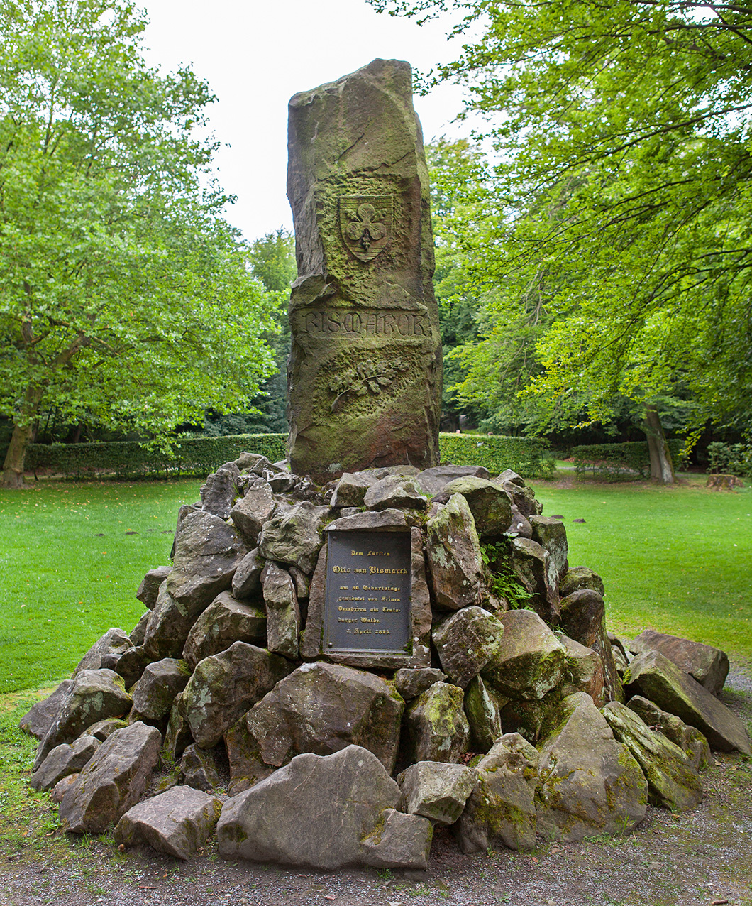 Bismarckstein am Hermannsdenkmal, Grotenburg, Detmold